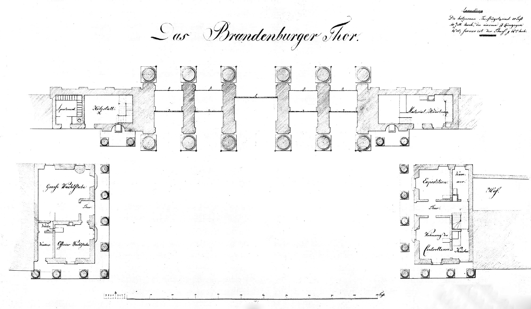 Grundriss des Brandenburger Tores 1820